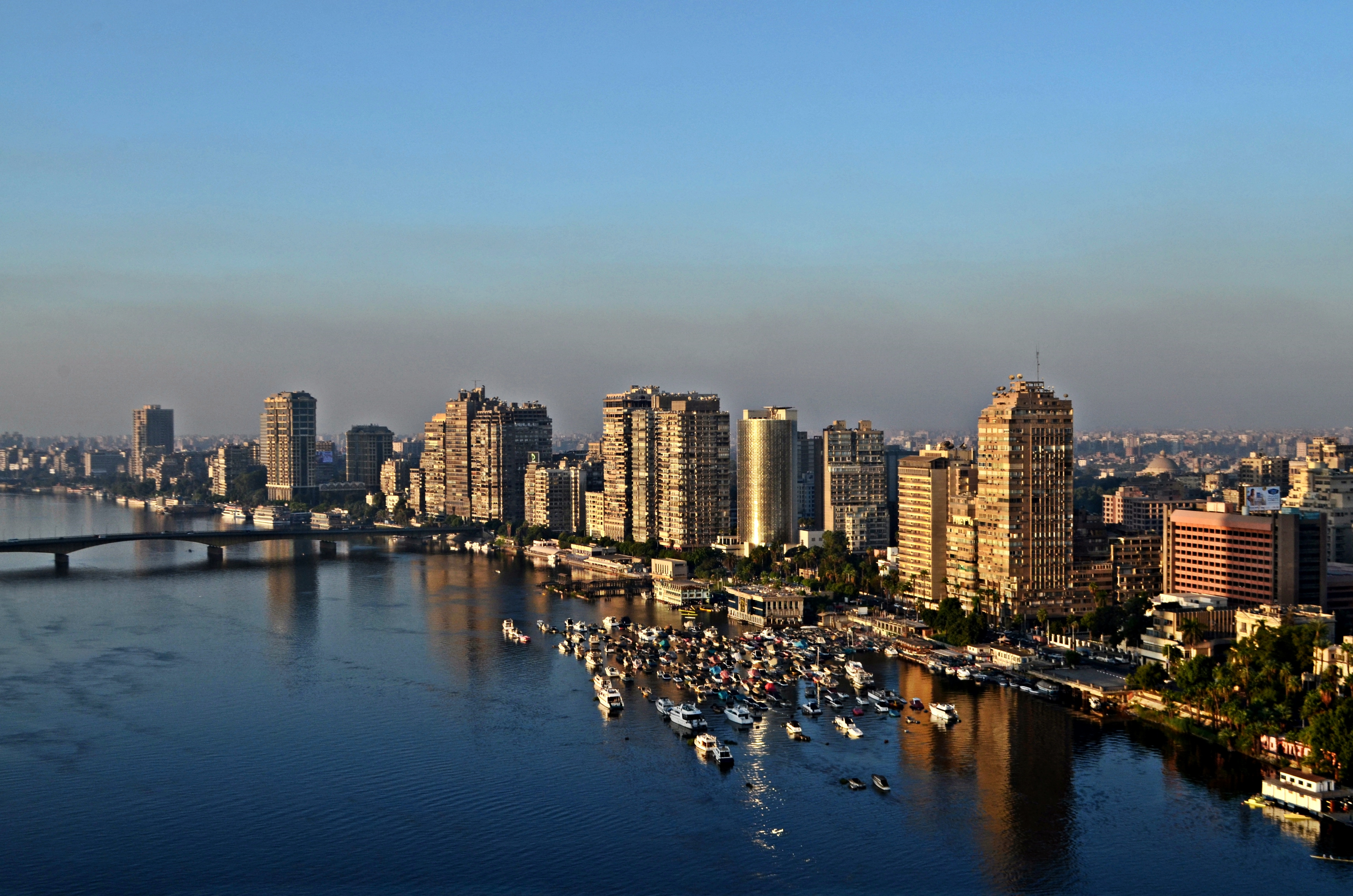 مدينة الجيزة على نهر النيل، مصر